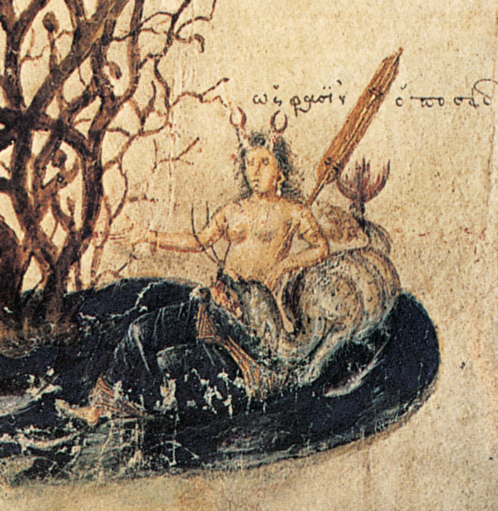 Thalassa (Thalatta), die Personifikation des Meeres (Wiener Dioskurides. Ausschnitt aus Blatt 391 verso)